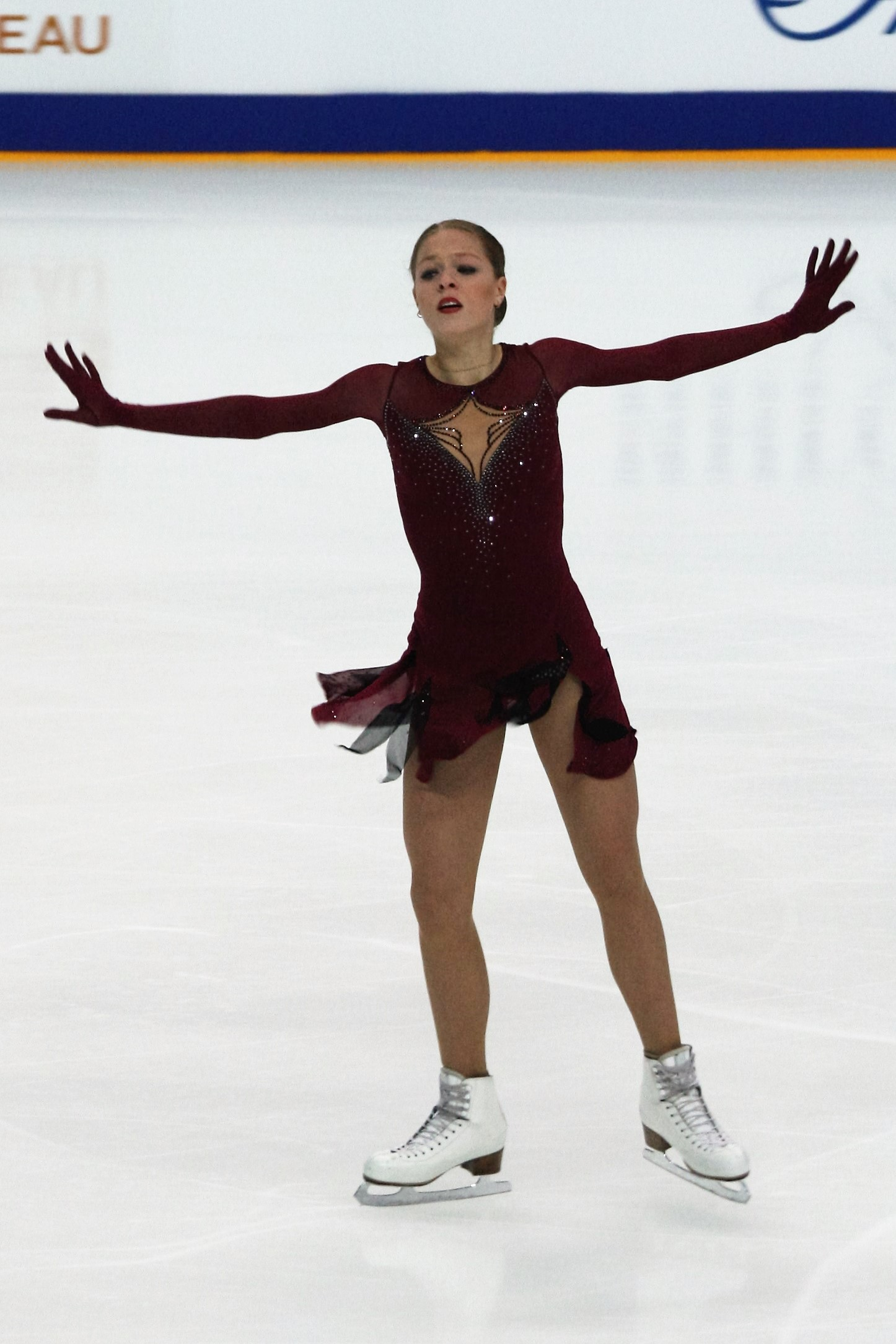 Анастасия Галустян (Армения) на Кубке Ростелекома 2016